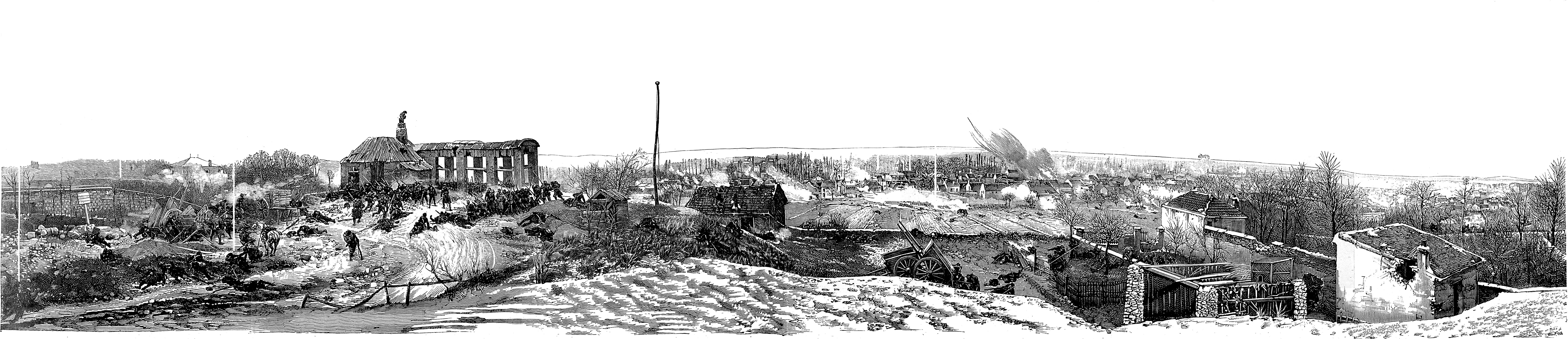 Dessin représentant la partie exécutée par Alphonse de Neuville du panorama La Bataille de Champigny, issu du livret descriptif du panorama vendu aux visiteurs. Version nettoyée et sans les flèches numérotées.